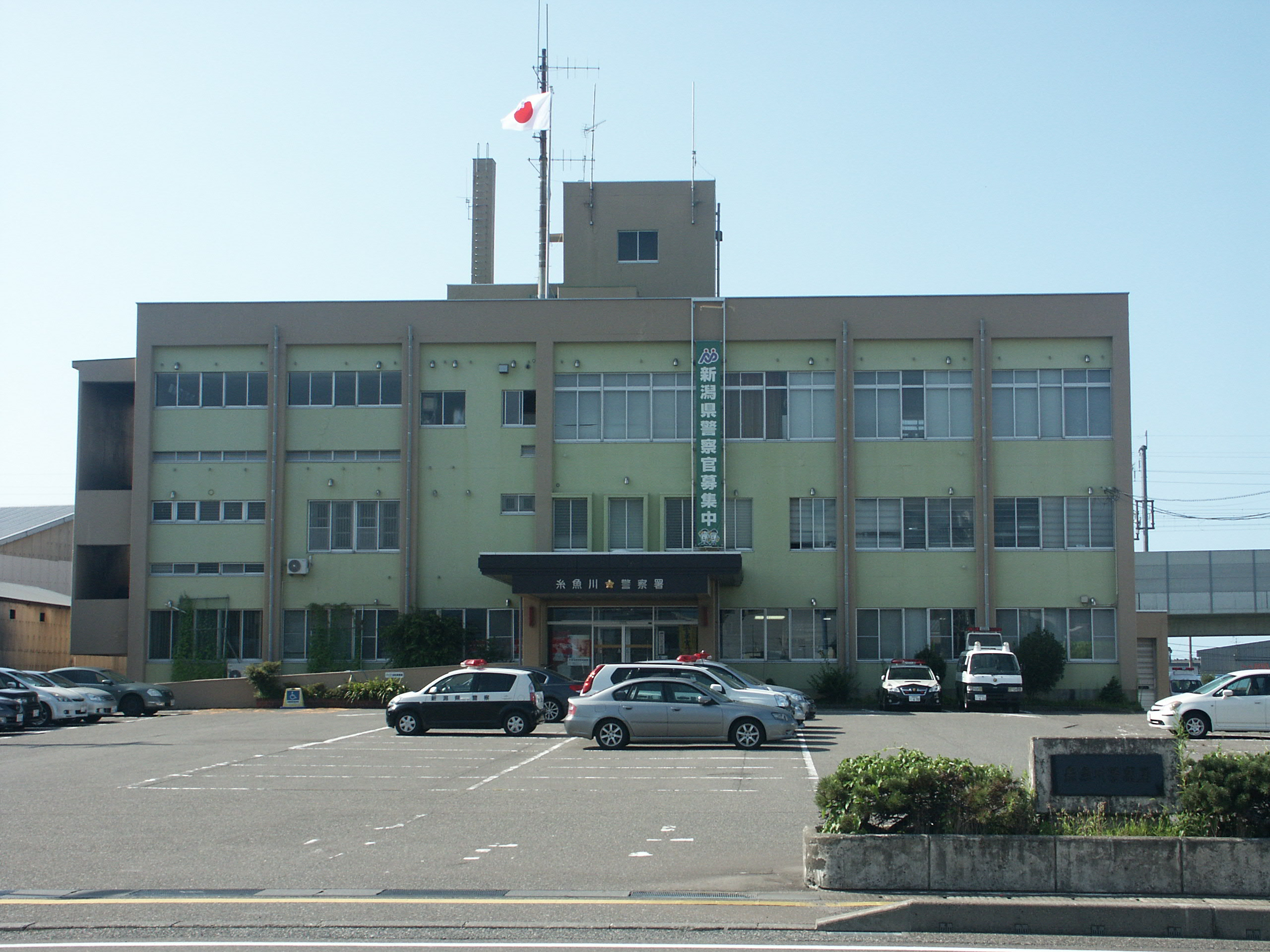 糸魚川警察署庁舎